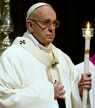 Papież Franciszek podczas Wigilii Paschalnej